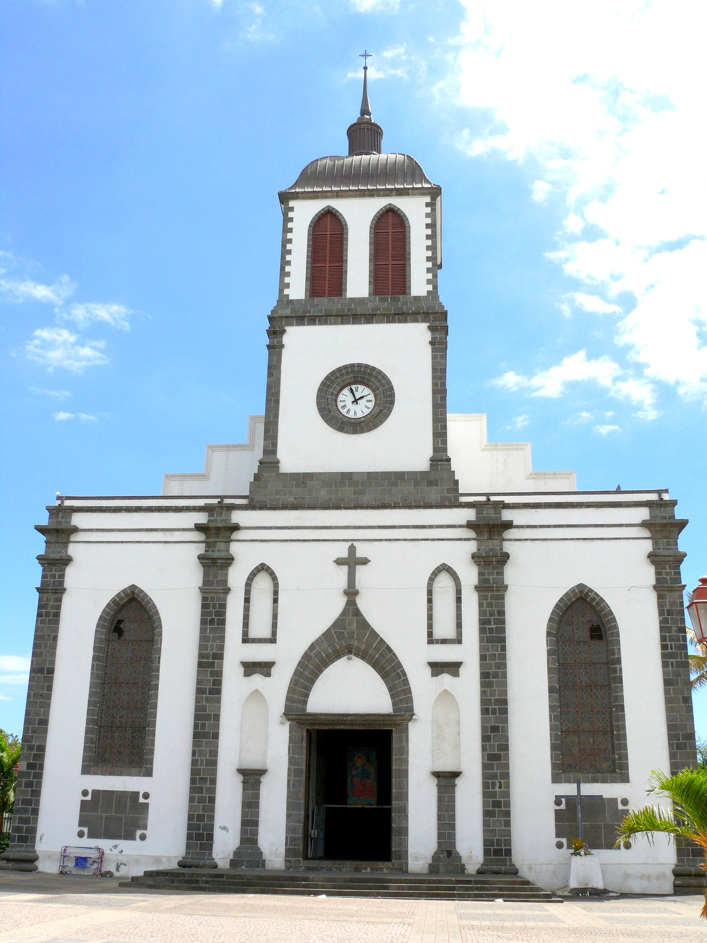 Saint-Louis - Eglise Saint-Louis - Façade